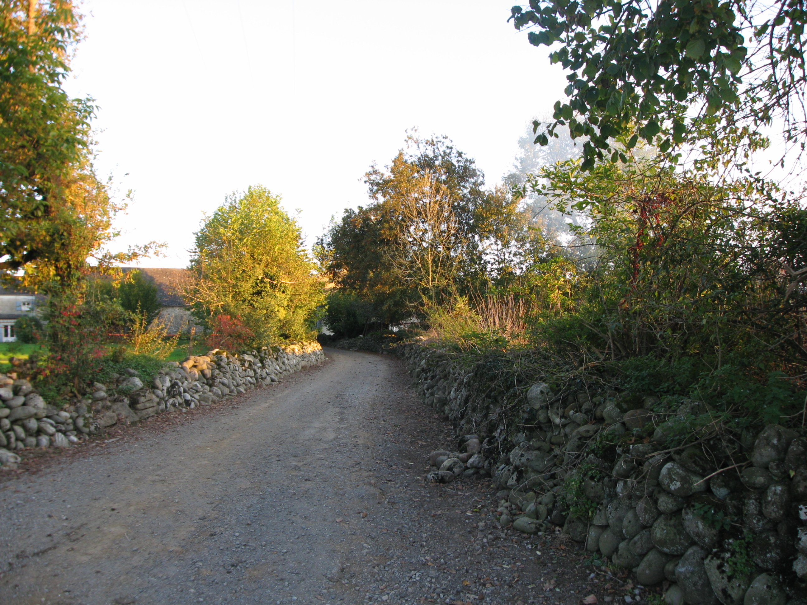 Entrée du village d'Escou par le chemin de randonnée (Pyrénées Atlantiques) Pyrénées).